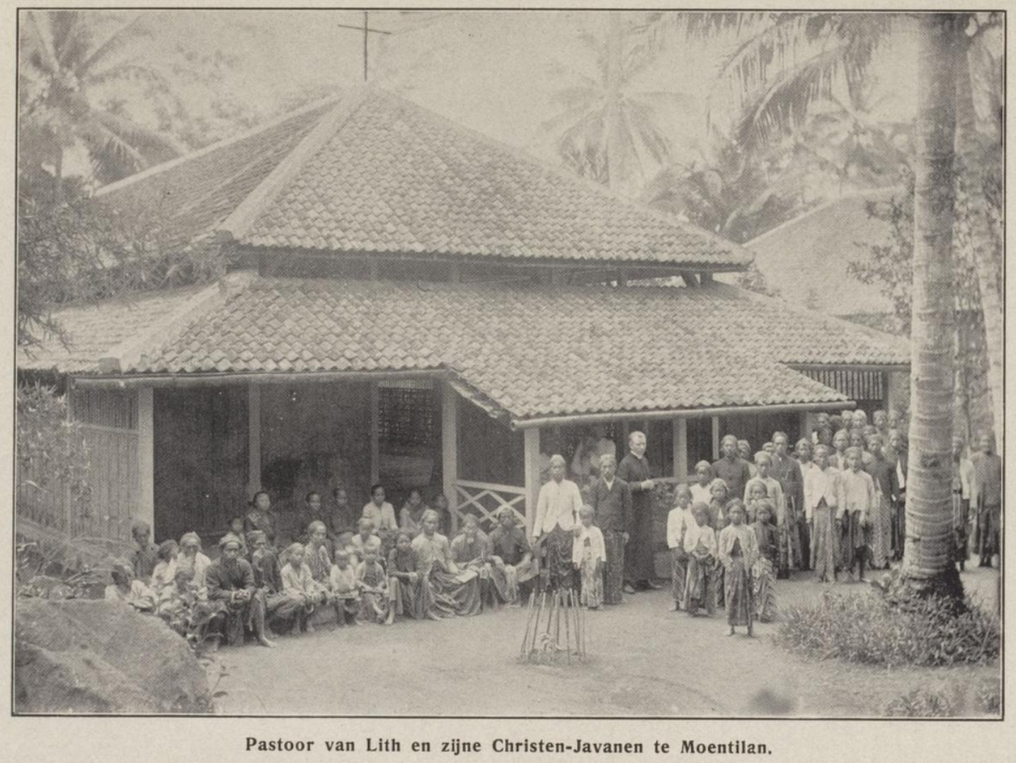 Pastor van Lith dan Christian Javanente Muntilan 1907